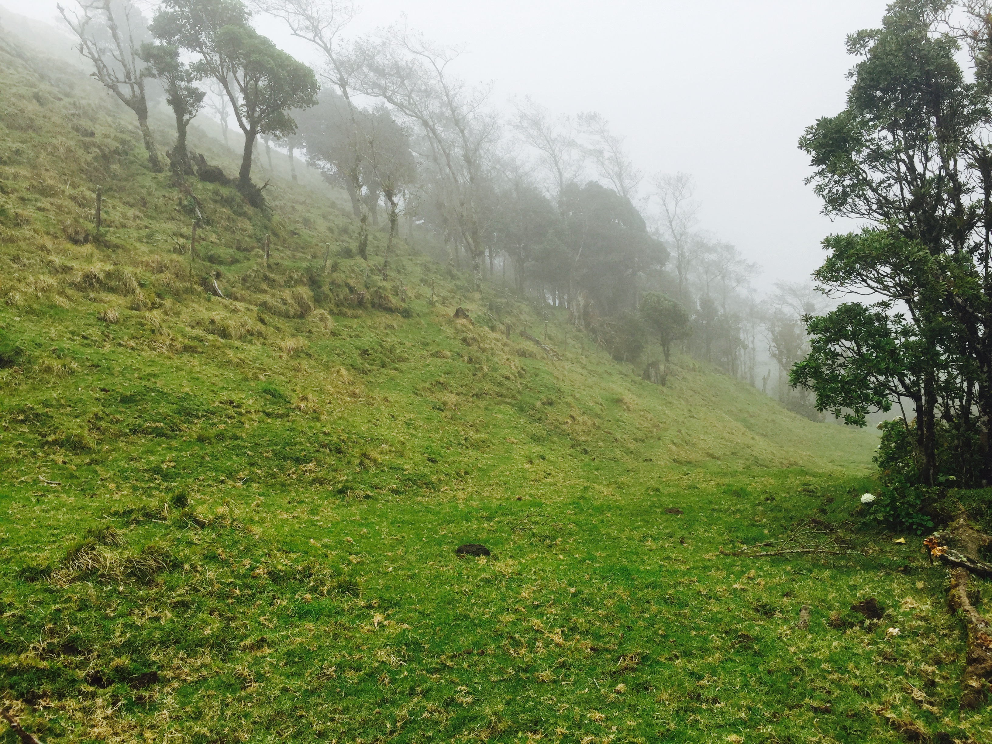 Area por reforestar